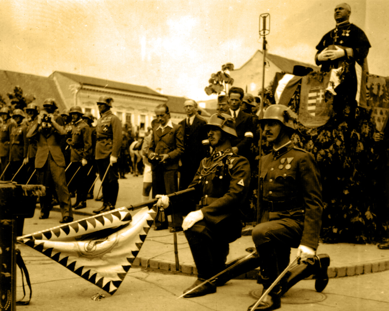 Rozsak tere